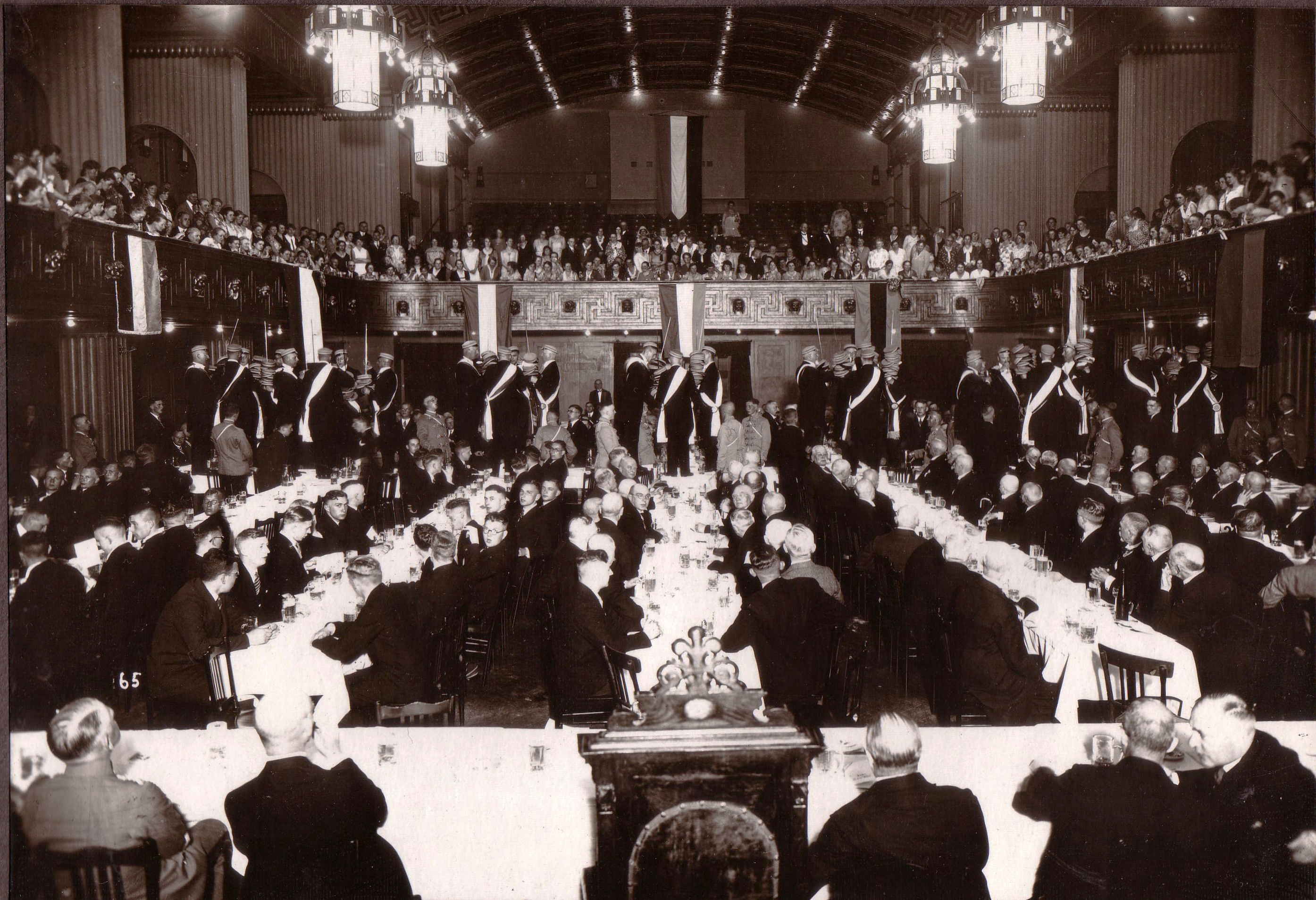 Kommers mit Feierlichem Landesvater beim 100. Stiftungsfest des Corps Masovia im Gebauhr-Saal der Stadthalle Königsberg. Das Bild ist auf dem Cover des Buches Sebastian Sigler (Hg.): Corpsstudenten im Widerstand gegen Hitler. Duncker & Humblot, Berlin 2014. ISBN 978-3-428-14319-1.